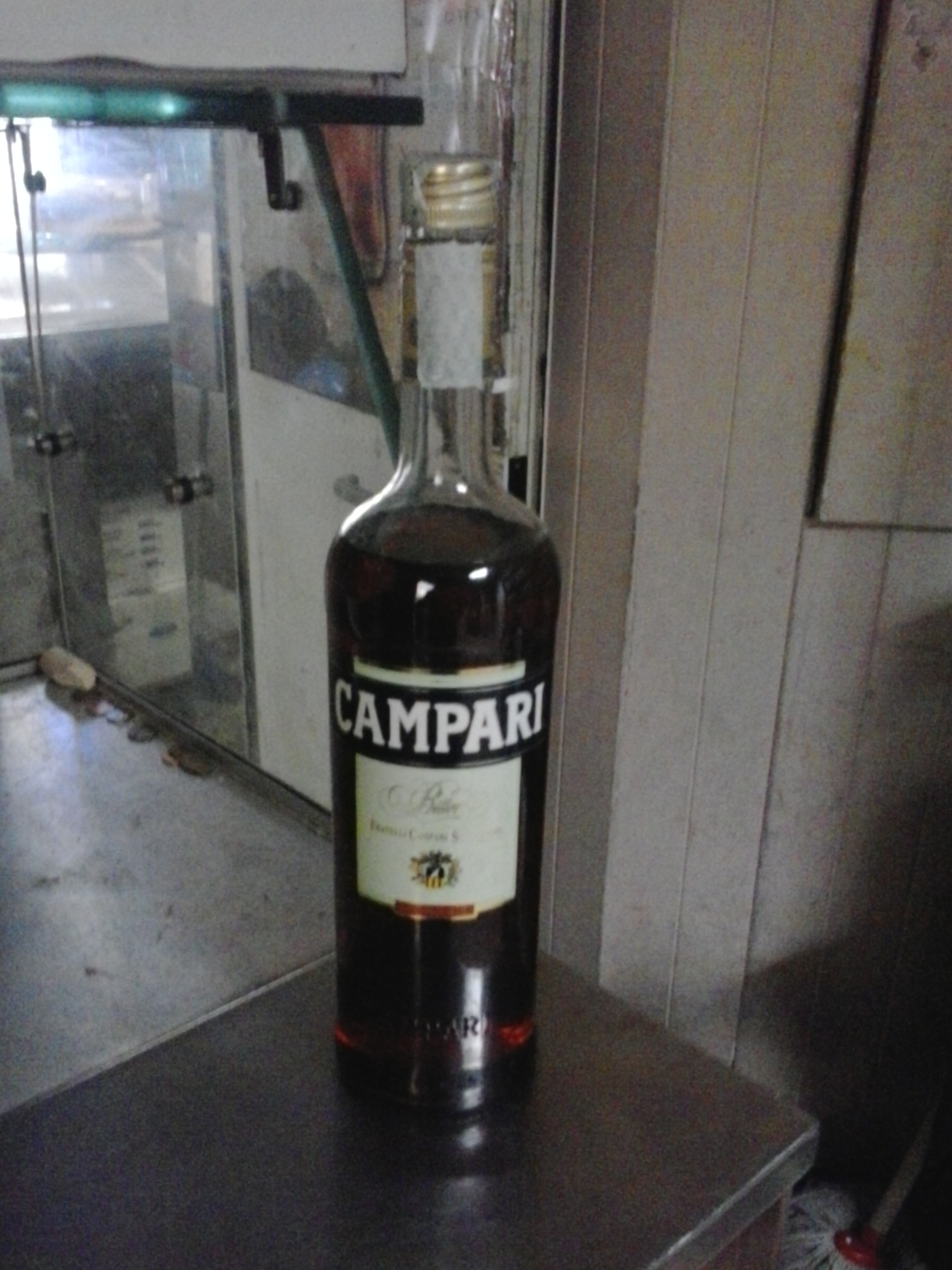 Campari Bitter